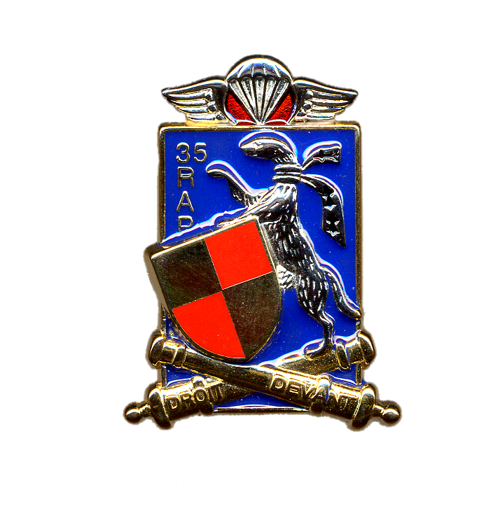 L'insigne du 35e RAP est composé d'un écu en bannière d'azur chargé de l'hermine de Vannes en tenant d'un écusson aux armes de la ville de Tarbes posées sur un sautoir de bombardes d'or à la devise en capitales du même "Droit devant", le tout adextré en chef du nombre et du sigle d'or "35 RAP" , sommé d'une coupole accompagnée d'un vol d'argent sur champ de gueules (amarante).